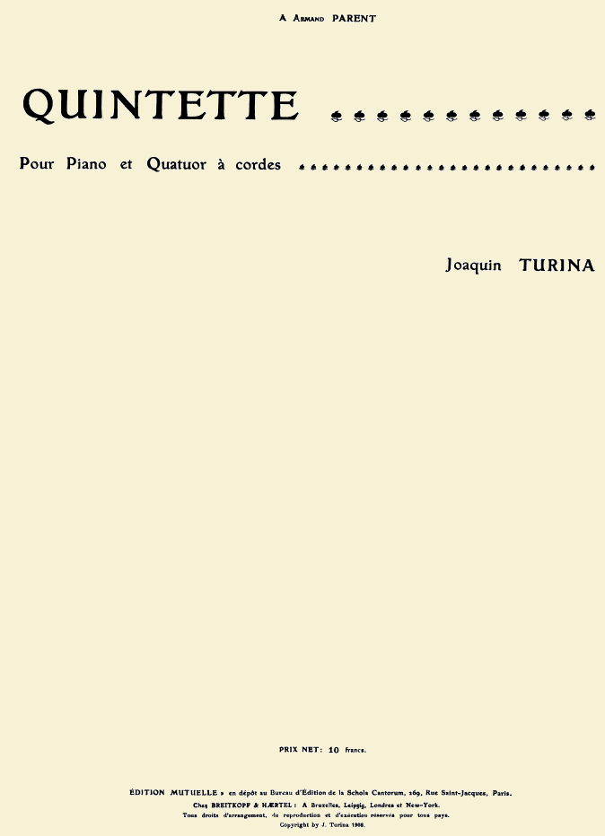 Joaquín Turina - Quintette pour piano et cordes op.1, couverture